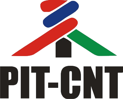 Logo del PIT-CNT